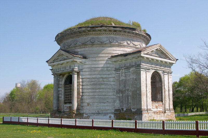 Капліца-пахавальня Скірмунтаў, Моладава